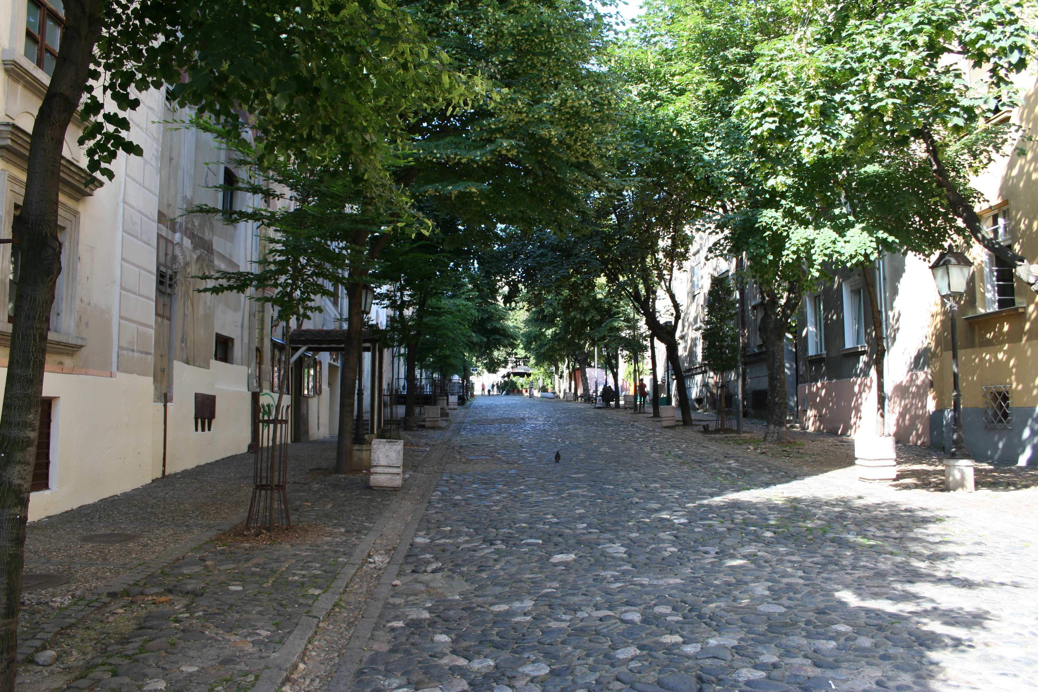 Skadarska ulica, Beograd